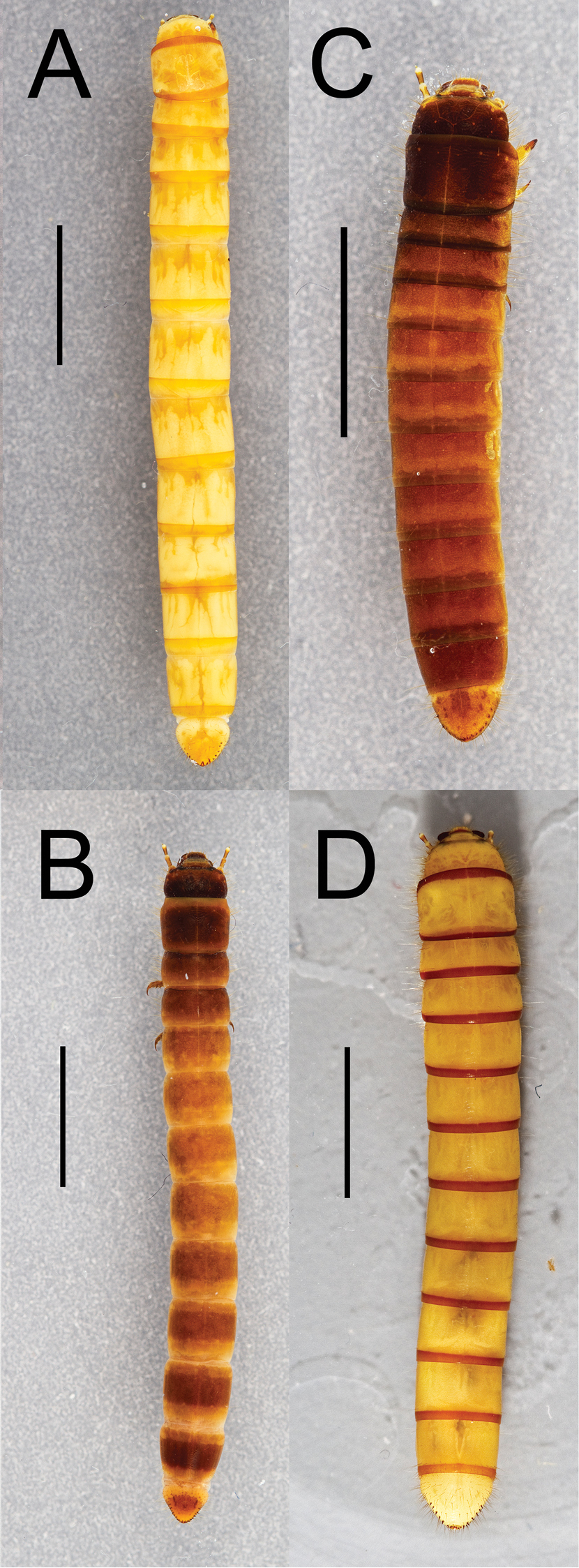 Dorsal habitus of four Eleodes species: A Eleodes (Litheleodes) extricatus, B Eleodes (Melaneleodes) anthracinus, C Eleodes (Melaneleodes) carbonarius, D Eleodes (Tricheleodes) pilosus. Scale bar = 5 mm.